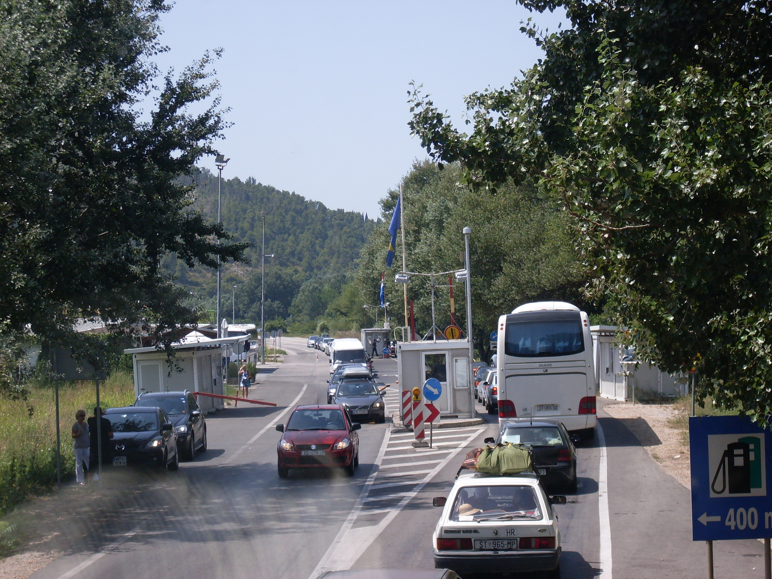 Doljani border between Bosnia and Herzegovina and Croatia